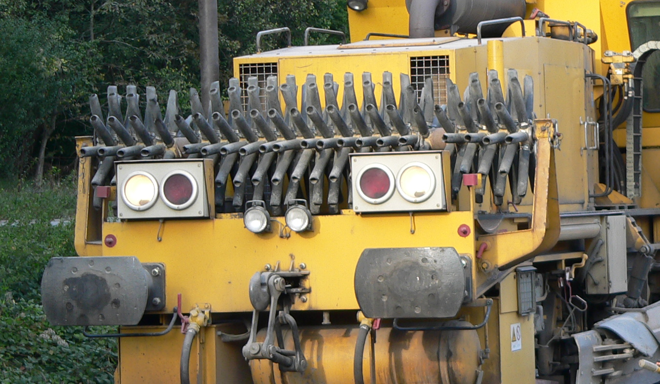 Schotterpflug (Schotterplaniergerät) auf der Enztalbahn bei Pforzheim